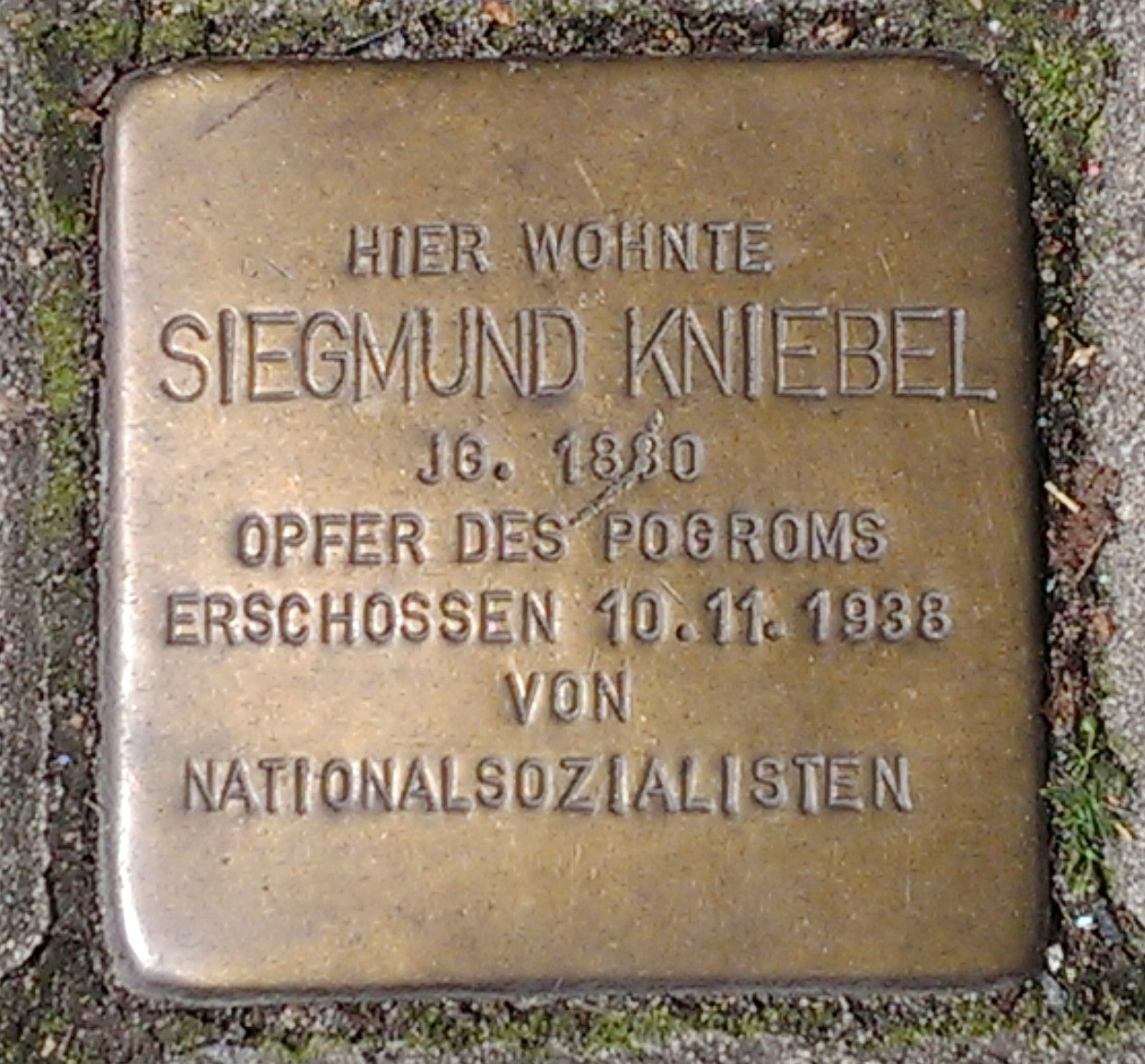 Stolperstein von Siegmund Kniebel in Lünen